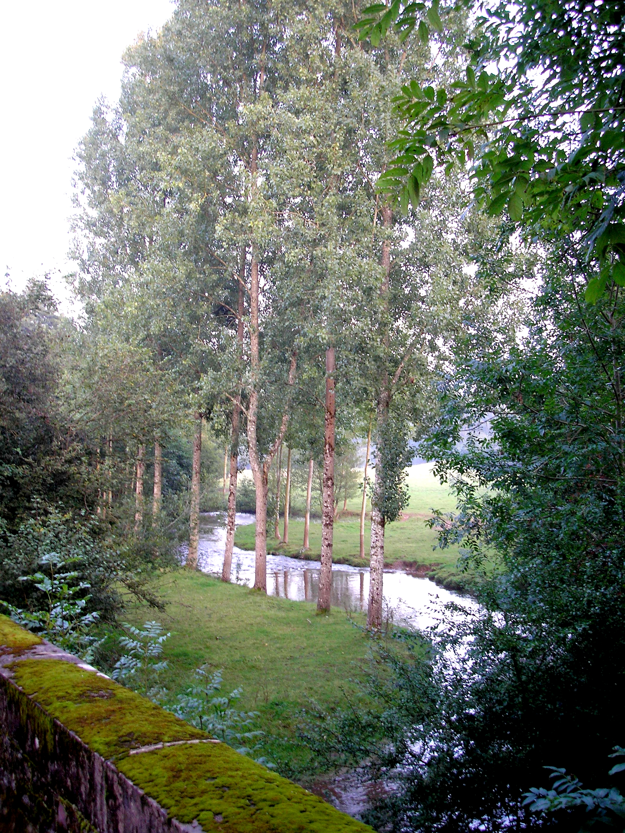 La Druance entre les communes de Périgny et Saint-Vigor-des-Mézerets (Normandie, France).